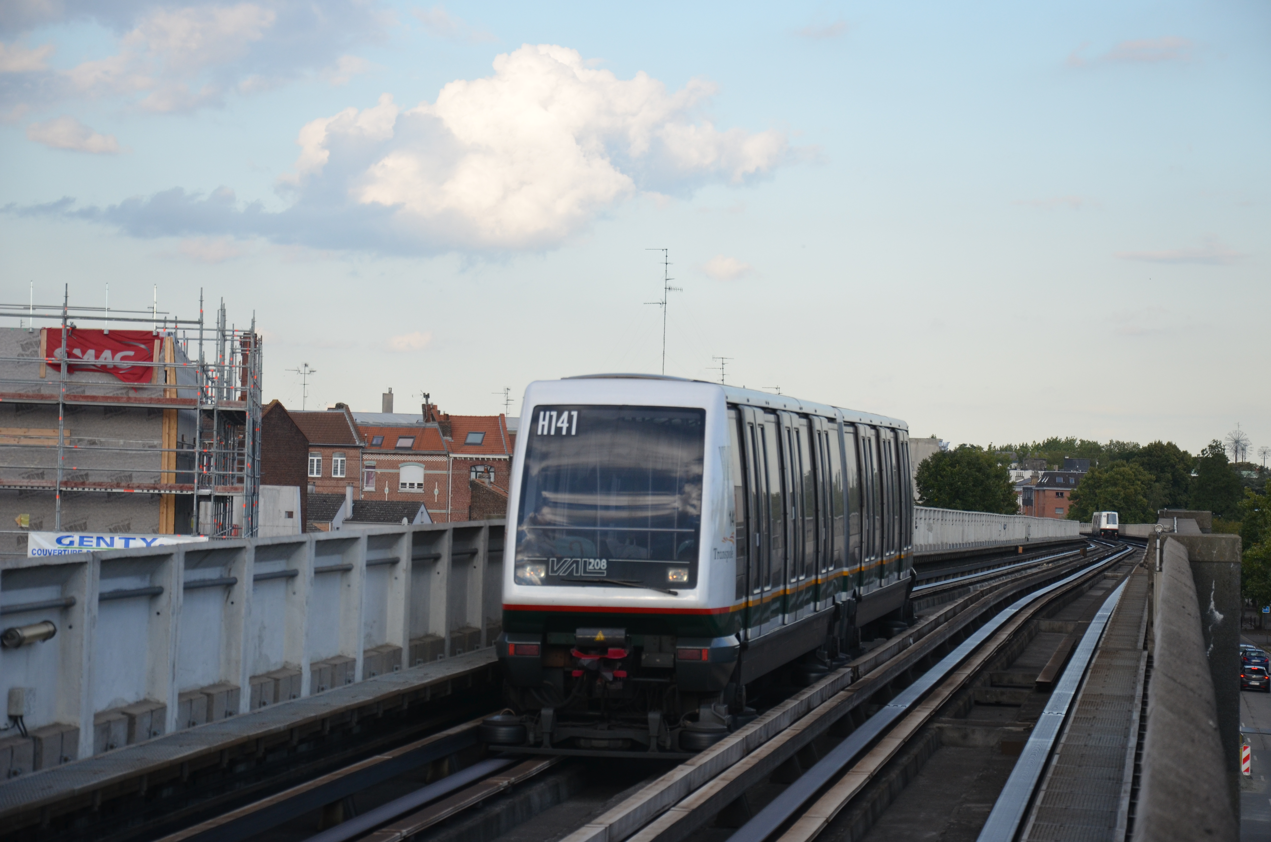 VAL 208 n°141 à Porte d'Arras, sur la ligne 2 du métro de Lille.